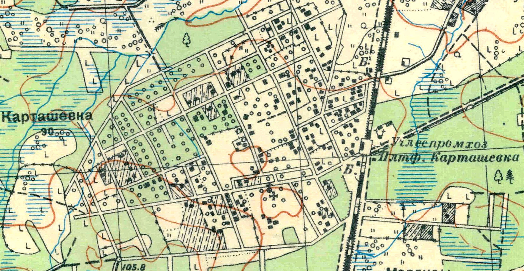 Топографическая карта Ленинградской области, квадрат О-36-13-В-в (Старо-Сиверская), посёлок Карташевская